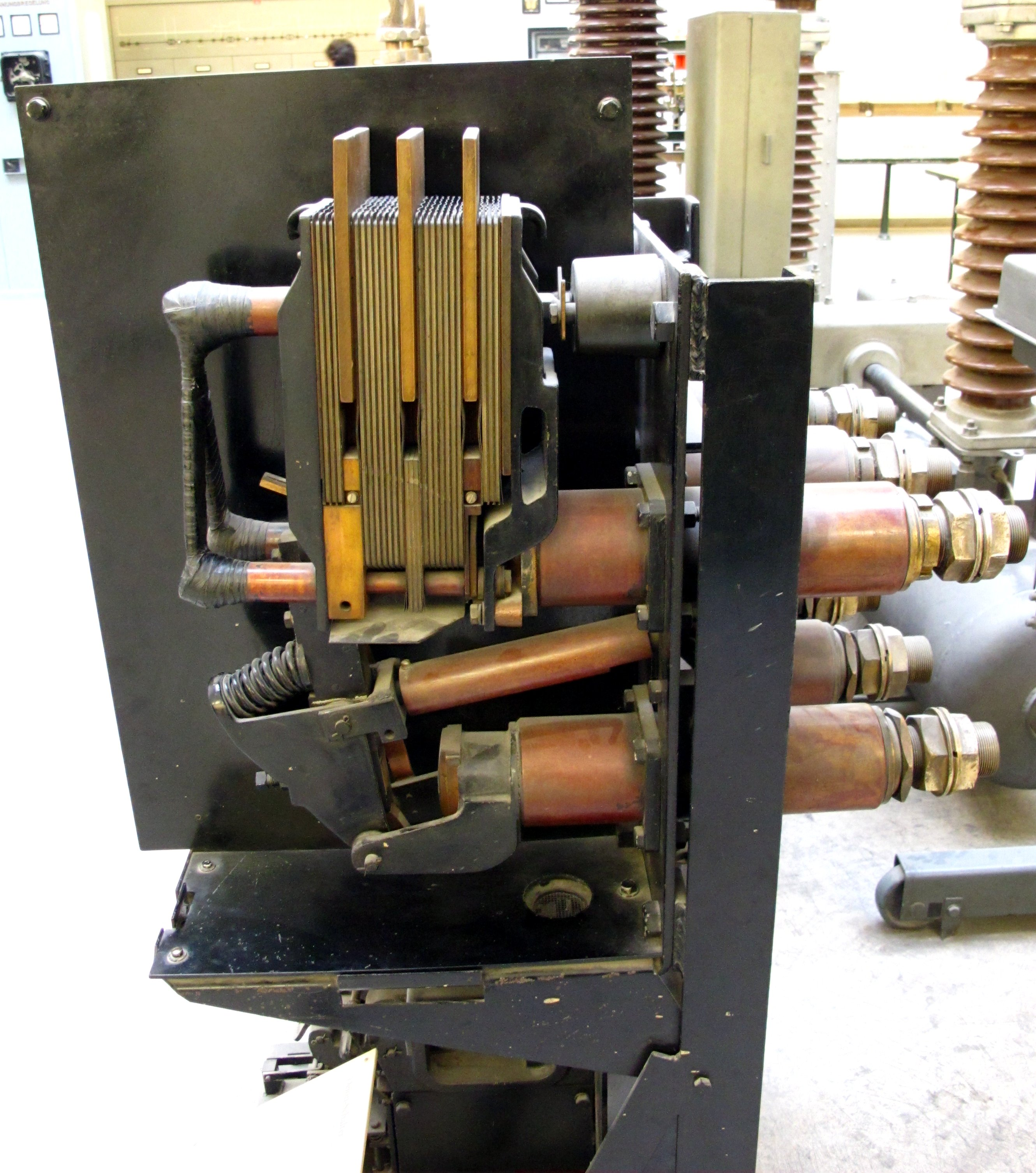 Leistungsschalter mit Deion-Kammern zur Löschung des Schaltlichtbogens. Seitliche Ansicht mit Deion-Kammern. Hersteller: Westinghouse, 1939 Spannung: 2500 V Strom: 2000 A